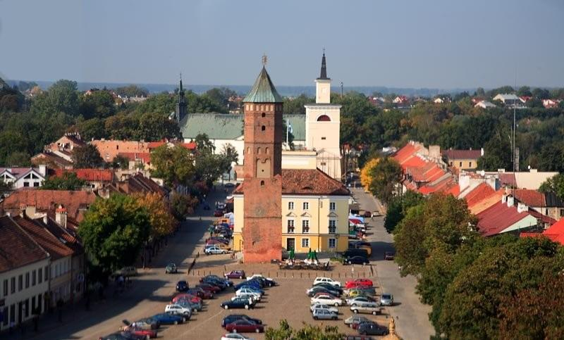 Polska